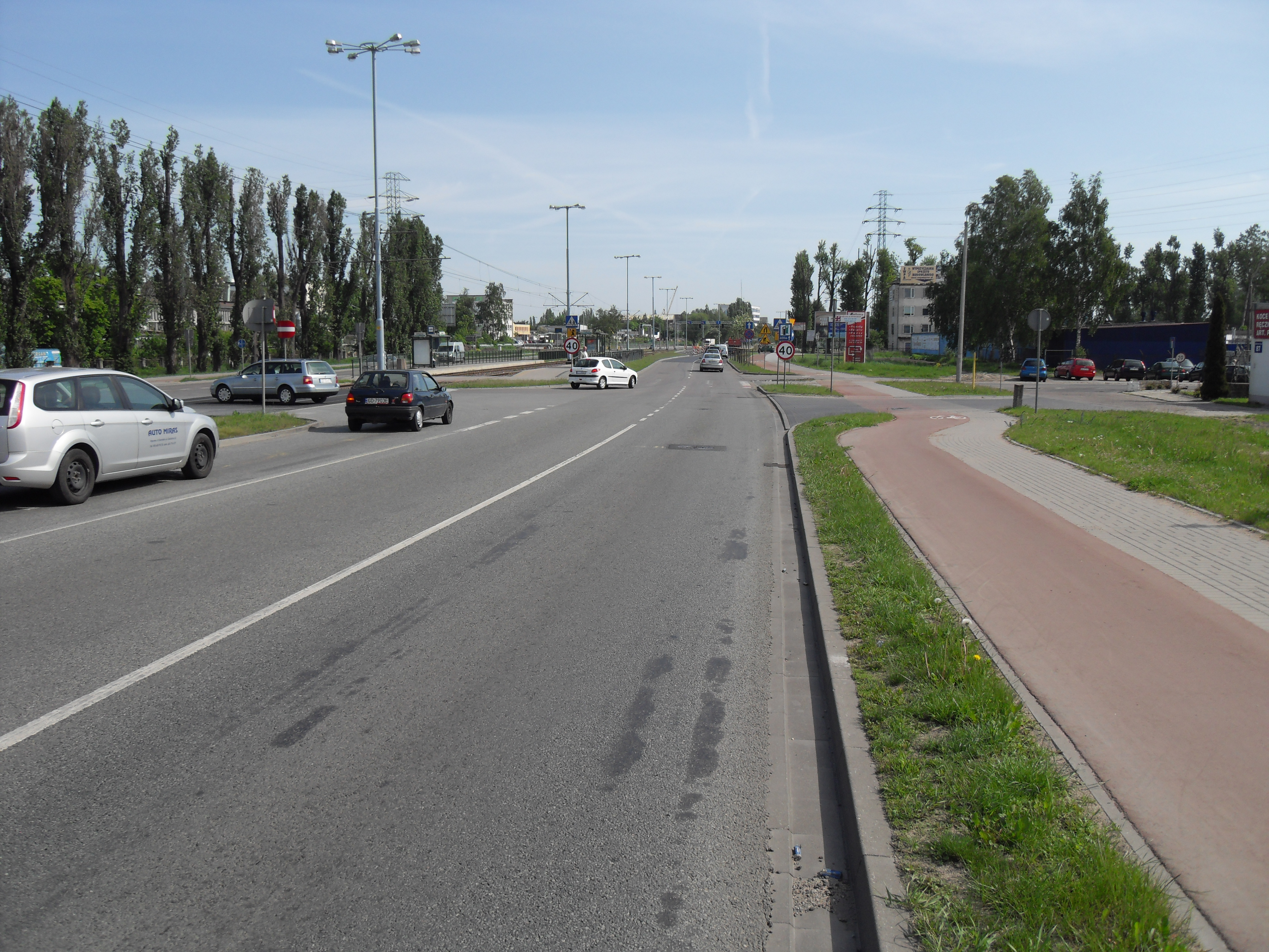 Gdańsk Letnica, ul. Marynarki Polskiej.